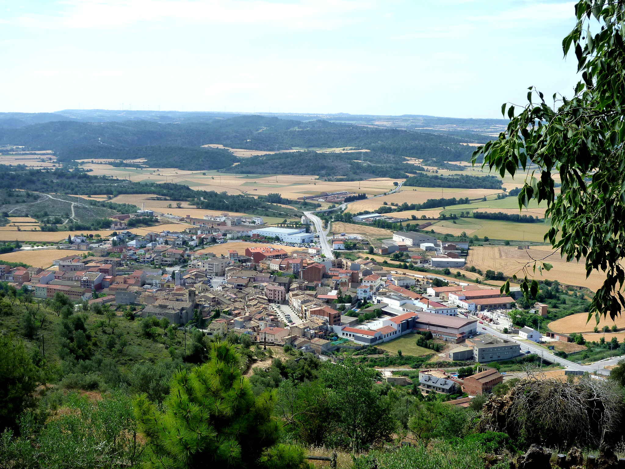 Torà des de l'Aguda